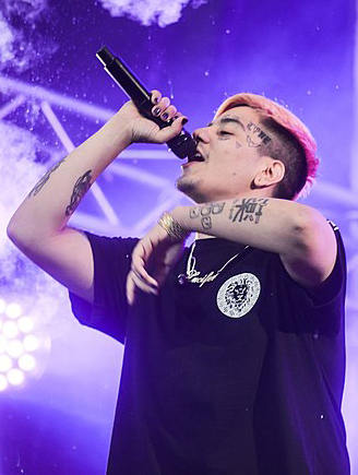 El cantante de freestyle argentino Duko en un concierto